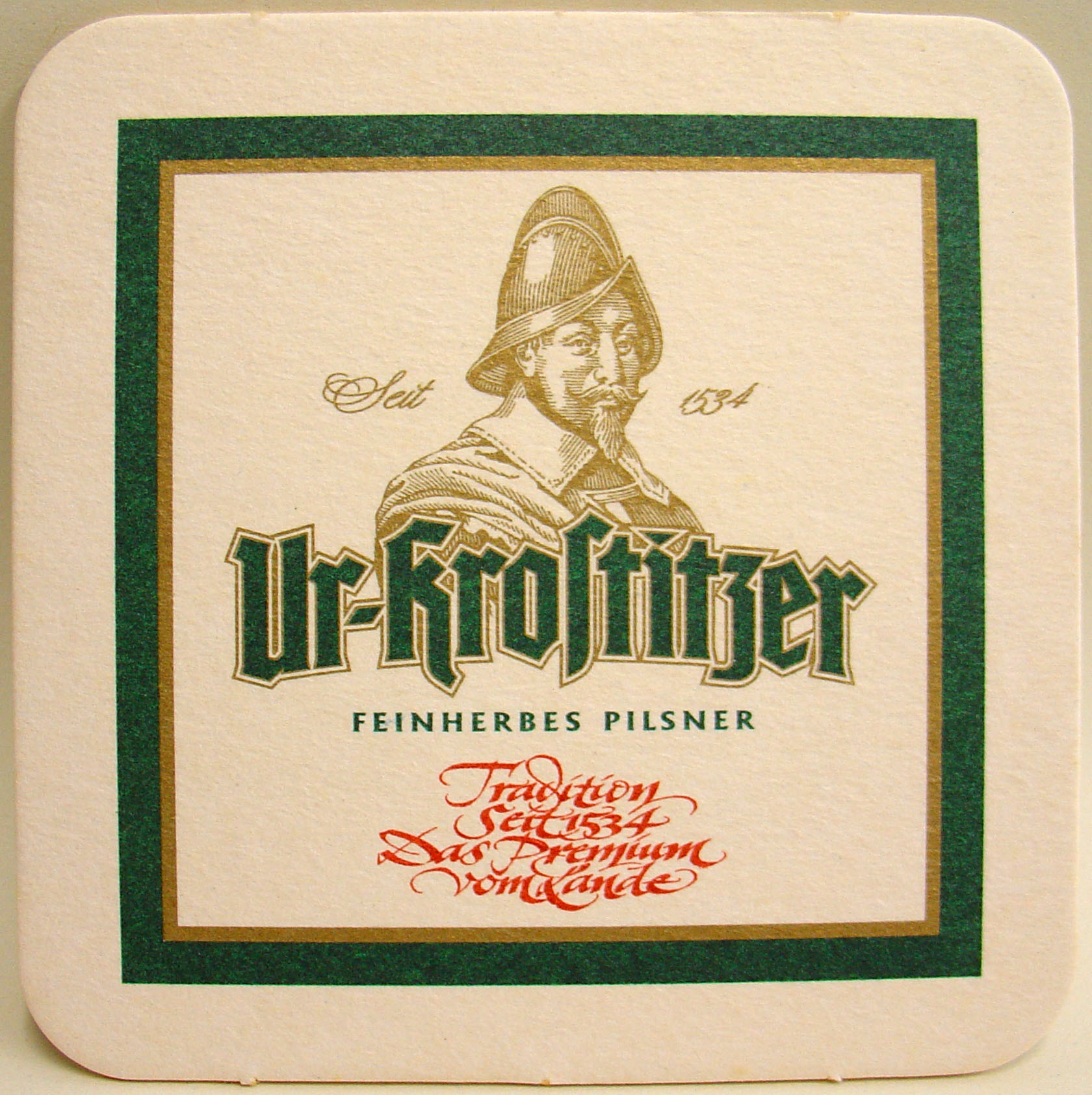 Bierdeckel der Ur-Krostitzer Brauerei